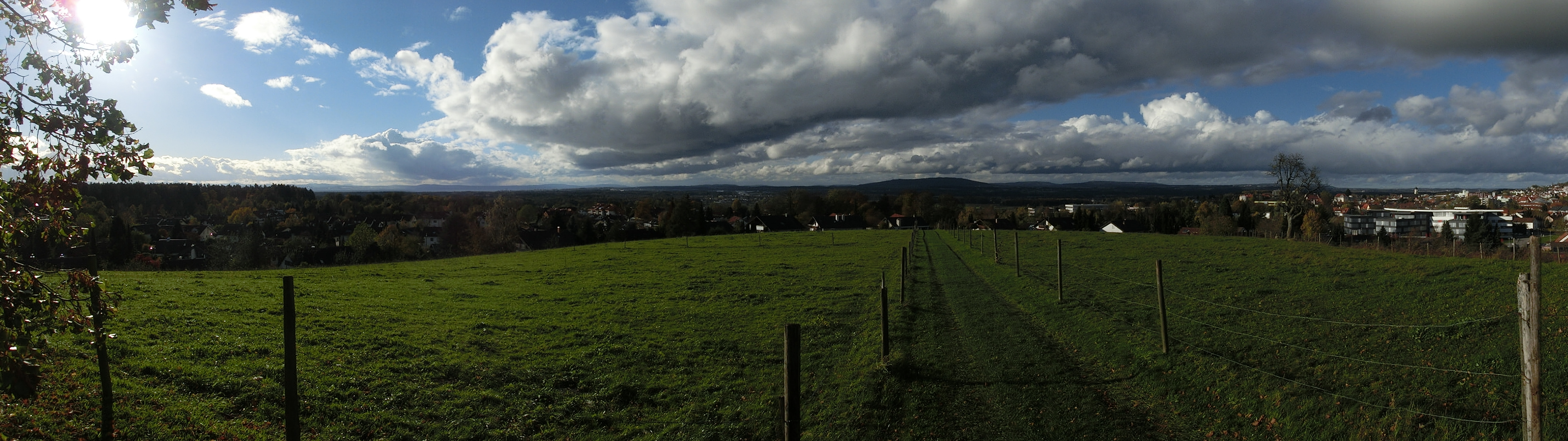 Deutschland - Baden-Württemberg - Bodenseekreis - Tettnang: Blick vom 'Gipfel' der „Höhe 493,8“ Richtung Friedrichshafen (Landschaftsschutzgebiet „Höhe 493,8 südlich Tettnang bei Schäferhof“)